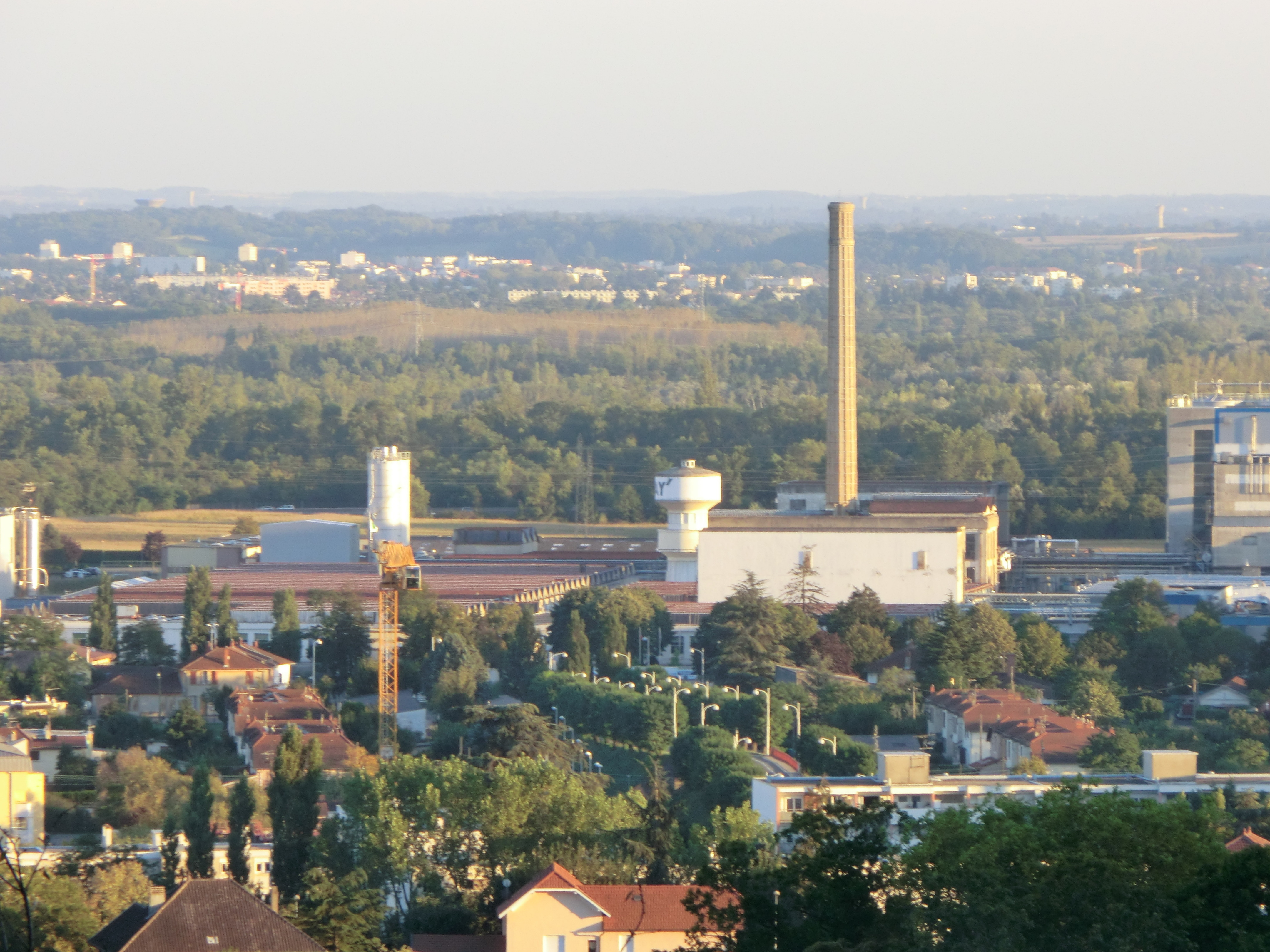 Vue de l'usine textile et chimique de Saint-Maurice-de-Beynost (depuis le cimetière de Saint-Maurice-de-Beynost).